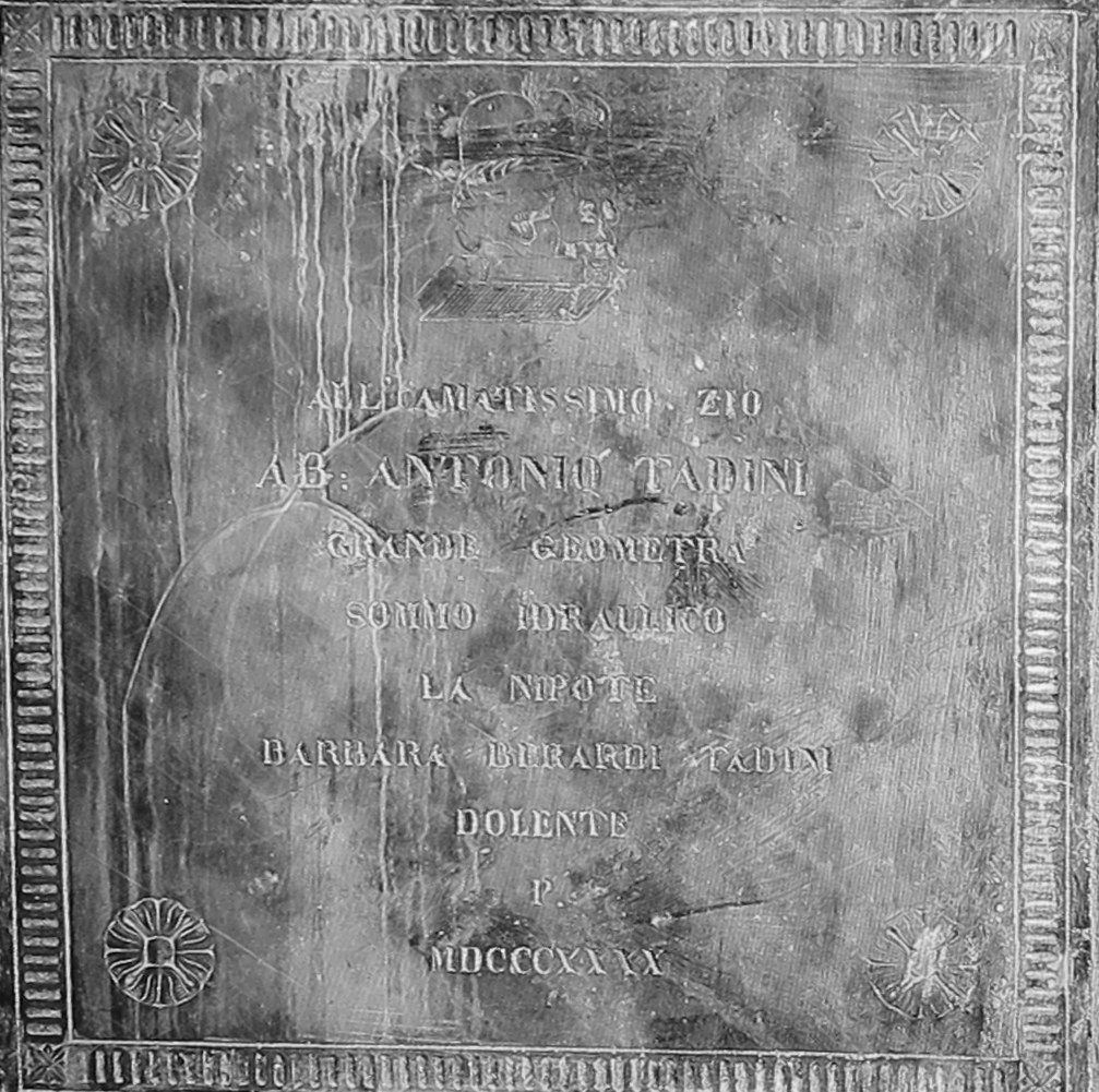 lapide tombale di Tadini